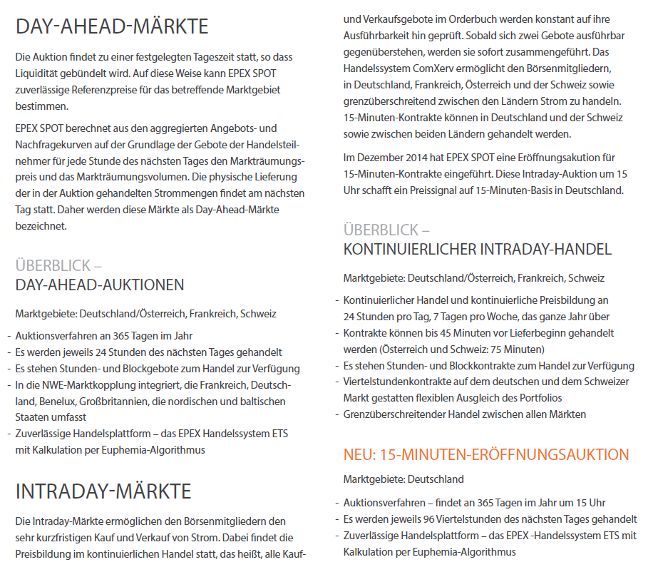 Überblick der von EPEX SPOT betriebenen Day-Ahead und Intraday-Märkte